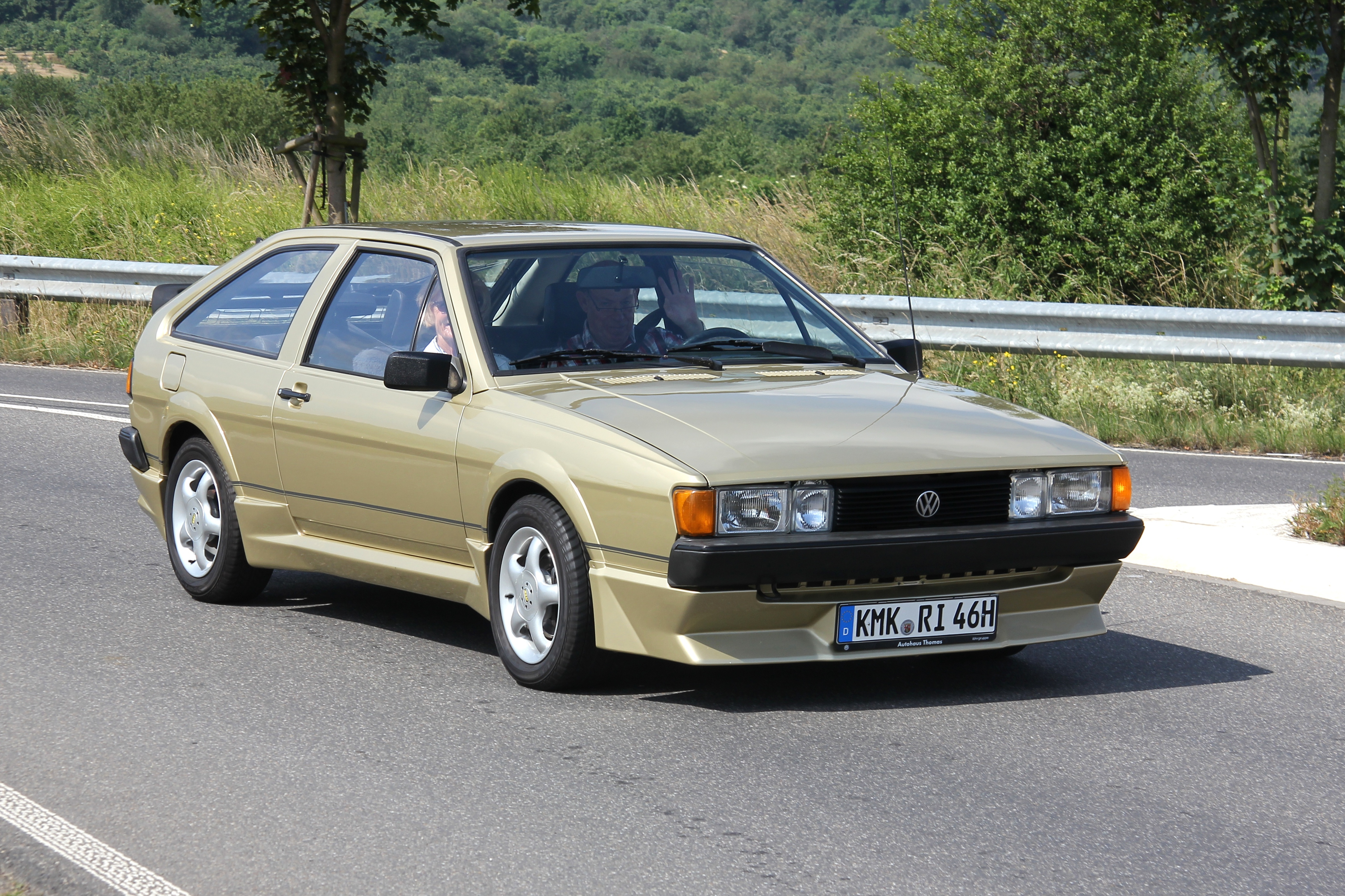 VW Scirocco GTX, Baujahr 1984; amtliches Kennzeichen verändert